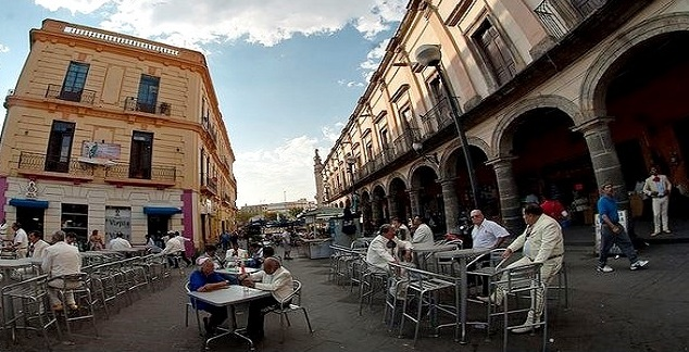 Clima Gdl 10 oct 2013 - Plaza de los Mariachis